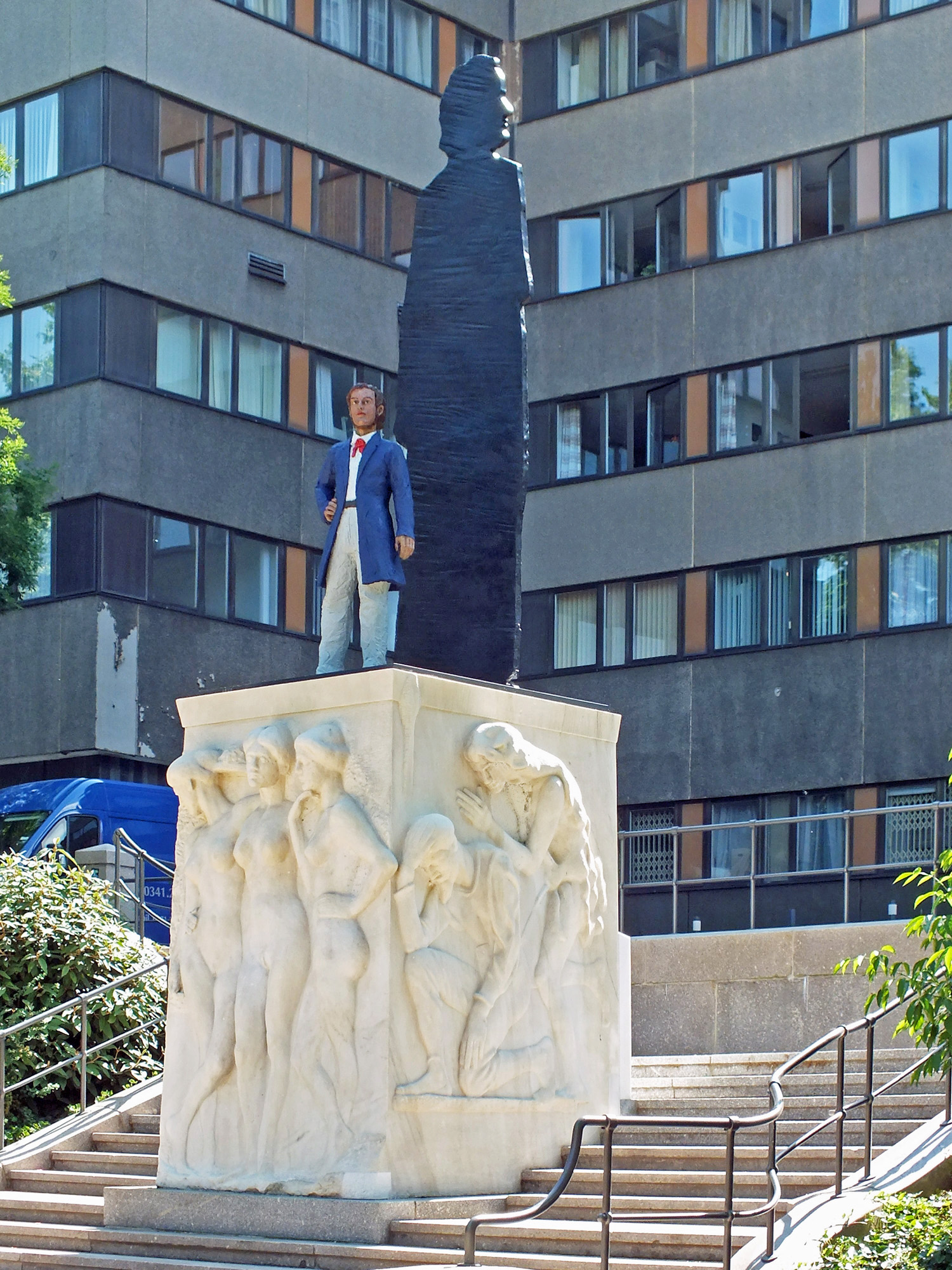 Das Richard-Wagner-Denkmal in Leipzig von Stephan Balkenhol auf dem Sockel von Max Klinger